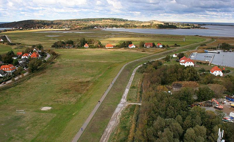 Landschaft zwischen Vitte und Kloster auf Hiddensee, KAP-Aufnahme aus 90m Höhe